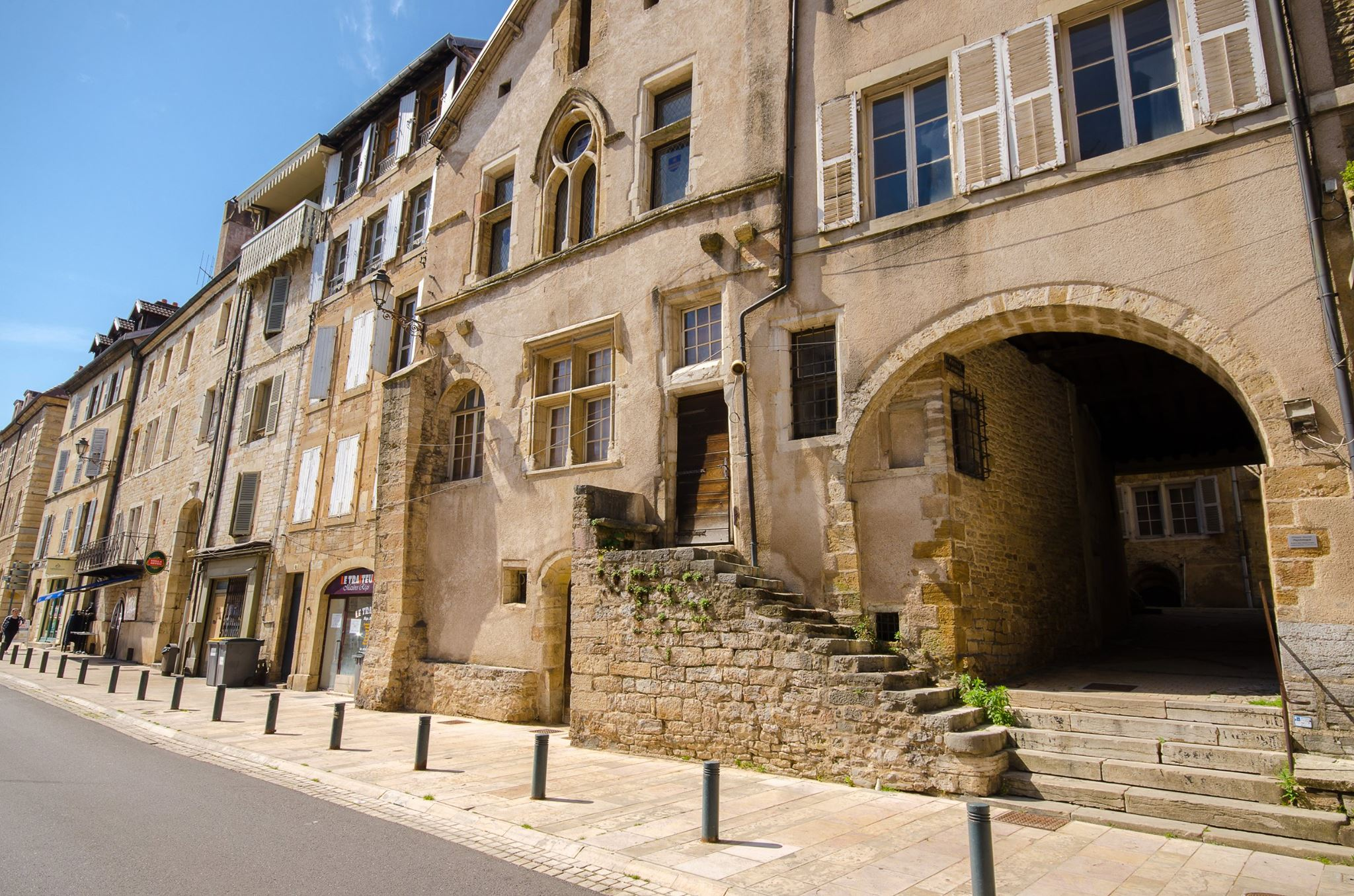 L'hôtel Baressols de Vesoul (Haute-Saône)